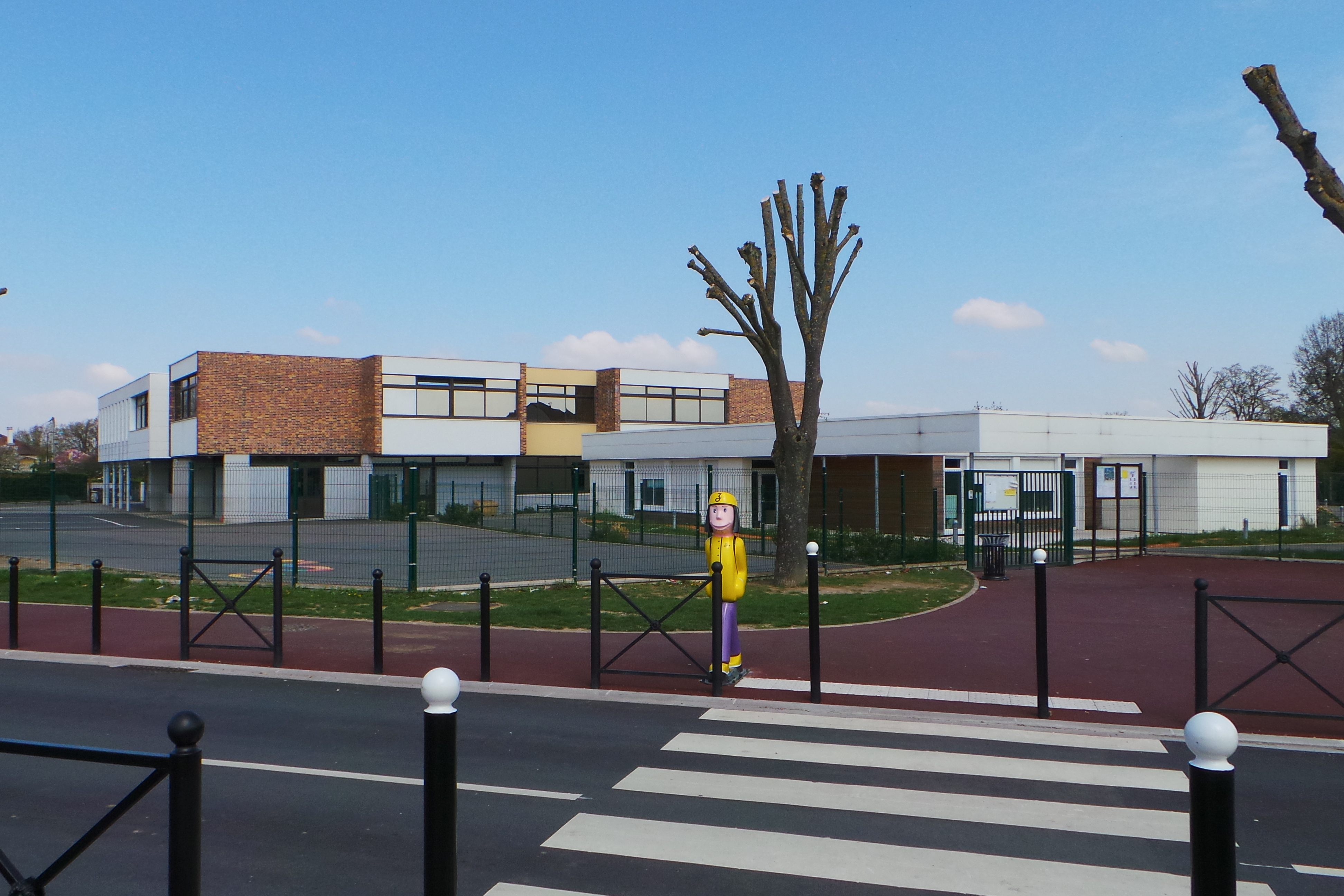 Groupe scolaire André Malraux, Le Coudray-Montceaux, Essonne, France